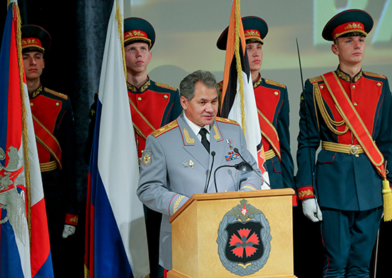 Министр обороны России генерал армии Сергей Шойгу в Главном разведывательном управлении Генерального штаба Вооруженных Сил в День военного разведчика